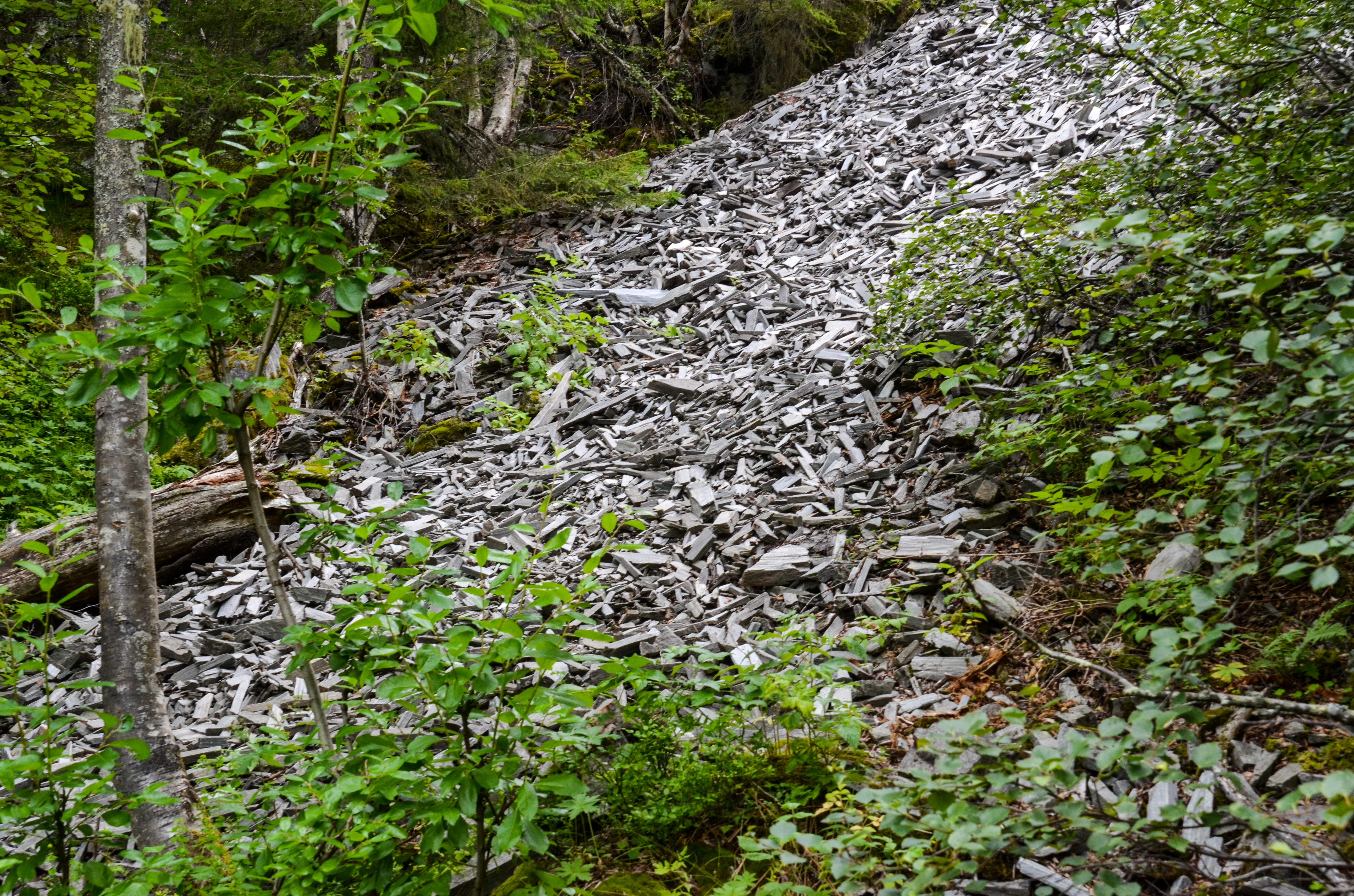 Schleifstein-Steinbruch Einsborg/Norwegen, Abfallhalde